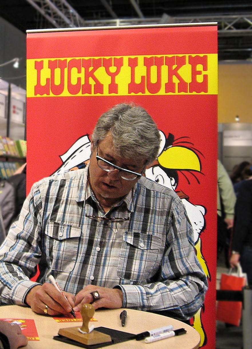 Achdé auf der Frankfurter Buchmesse auf dem Stand des Ehapa-Verlag.